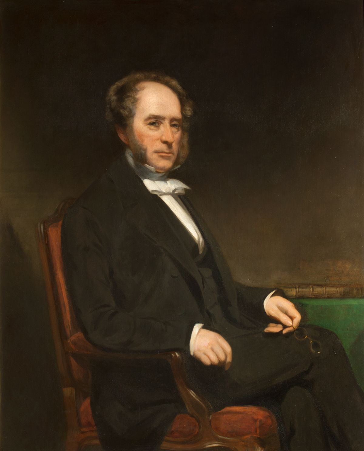 James Begbie (1798–1869)